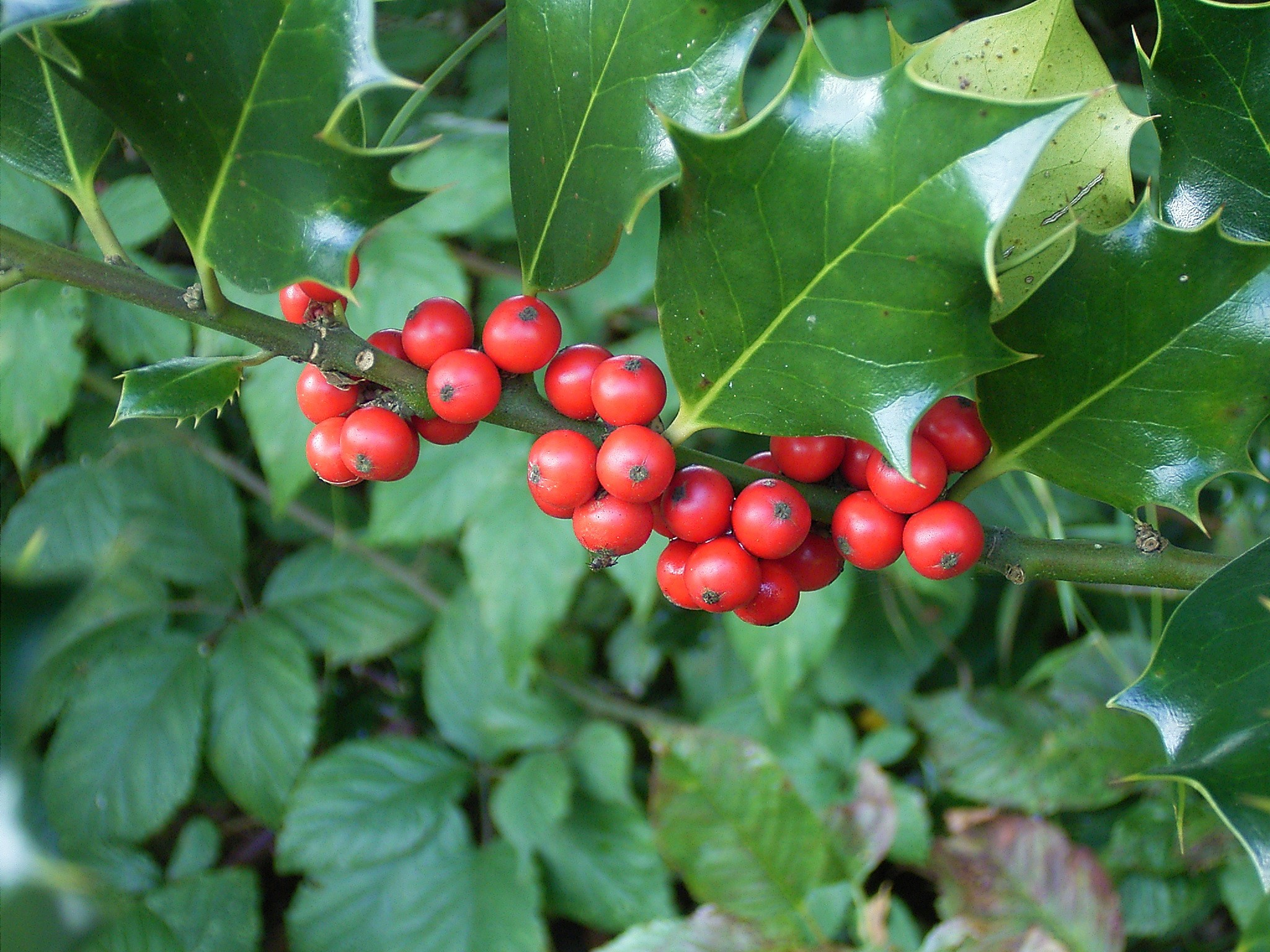 Ilex aquifolium